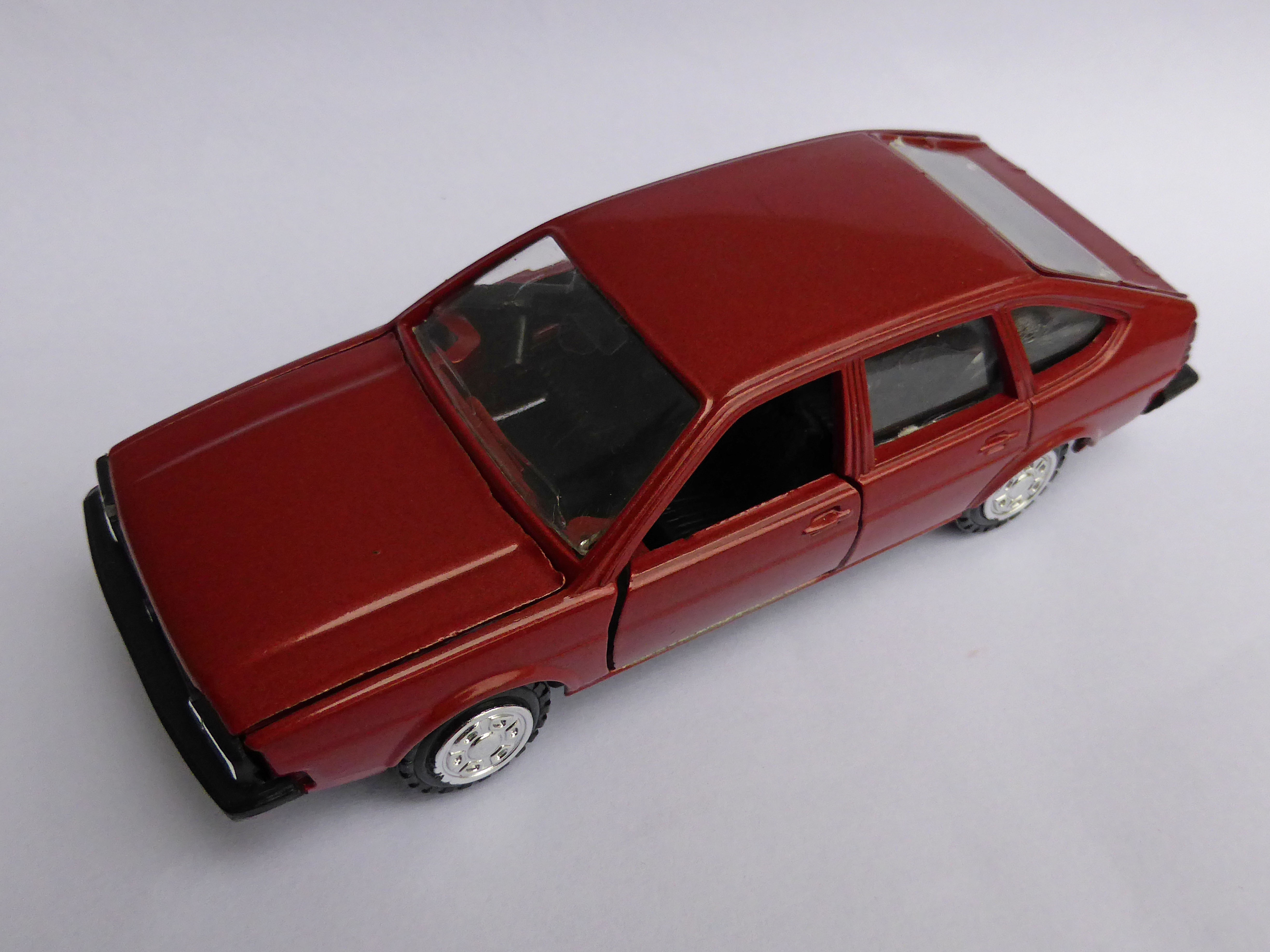 Modellauto von Fa. Conrad des VW Passat II. Schrägheck